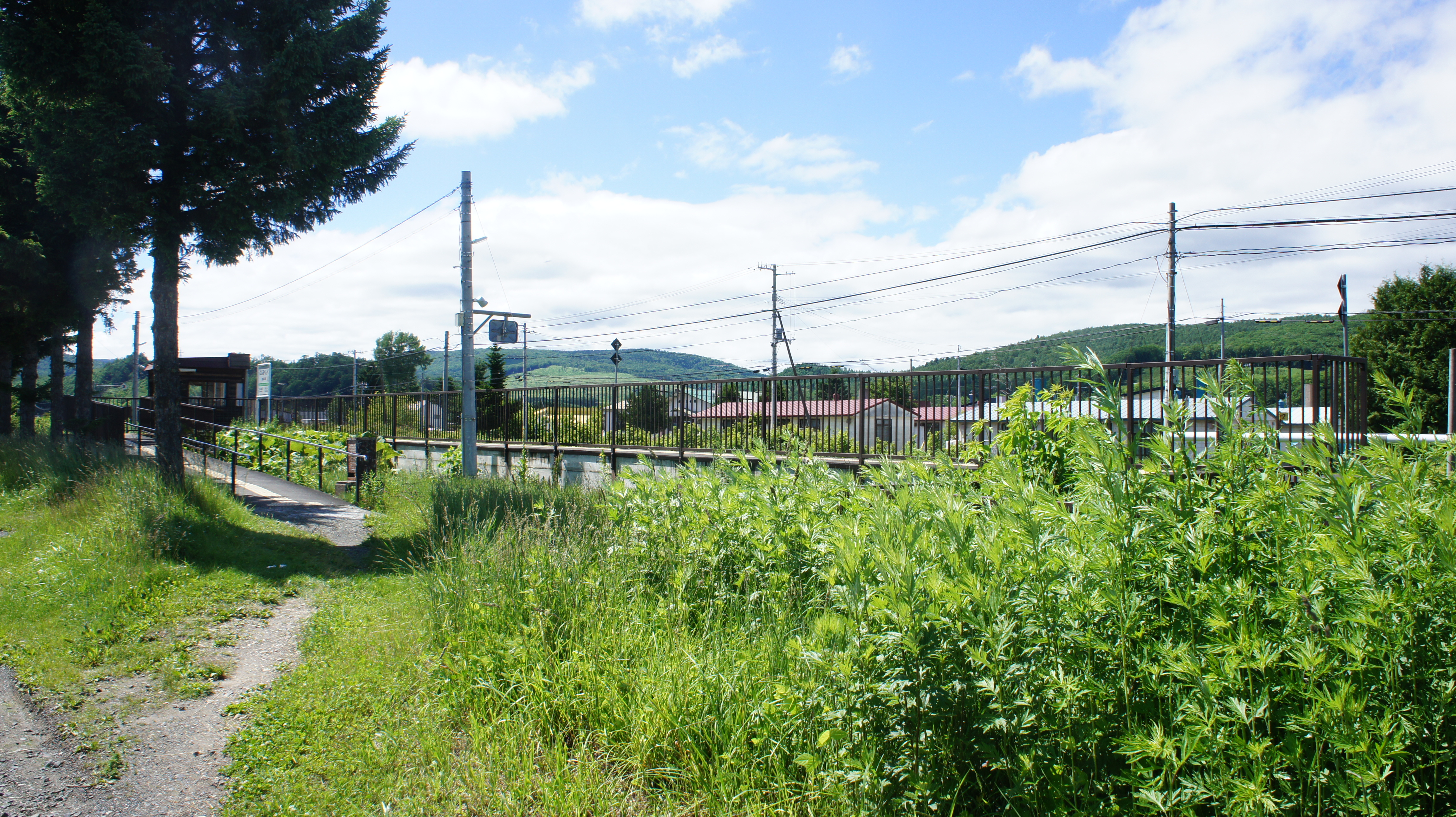 JR石北本線・西留辺蘂駅全体